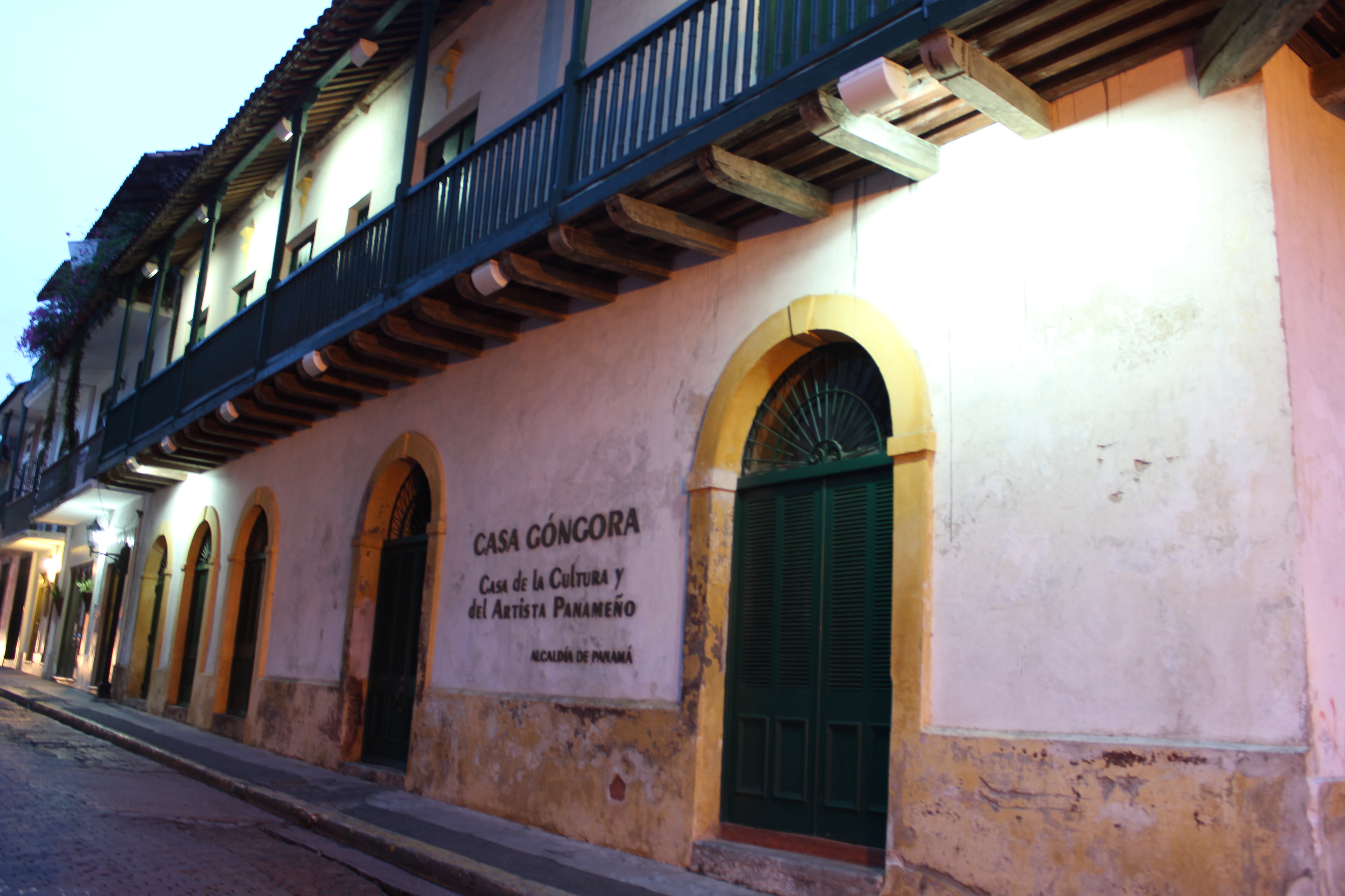 Casa Góngora en el Casco Antiguo de la ciudad de Panamá. Sitio declarado Patrimonio de la Humanidad por UNESCO.